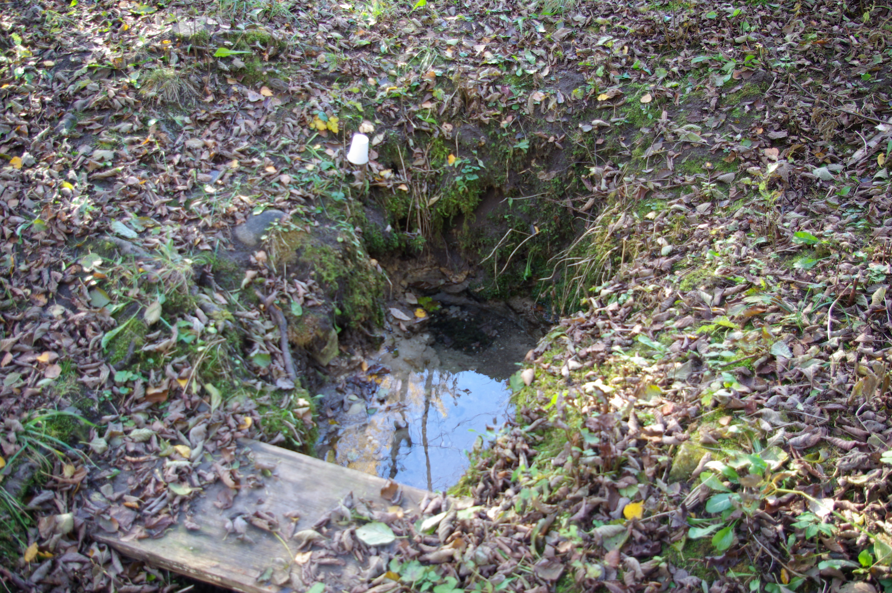 Tepija silmaallikas